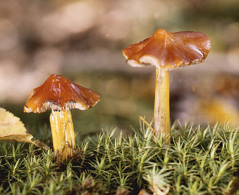 Schwärzender Saftling Fotograf: Walter J. Pilsak, Waldsassen Copyright Status: GNU Freie Dokumentationslizenz